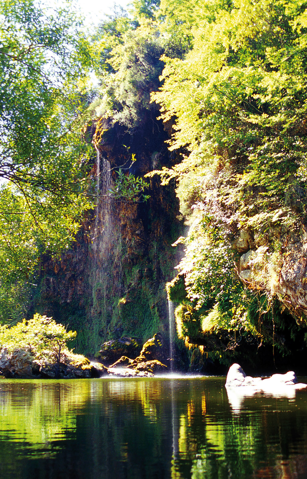 Sa stiddiosa è un sito di importanza naturalistica che richiama per le sue peculiarità, migliaia di visitatori e turisti. Si trova lungo il Fiume Flumendosa .